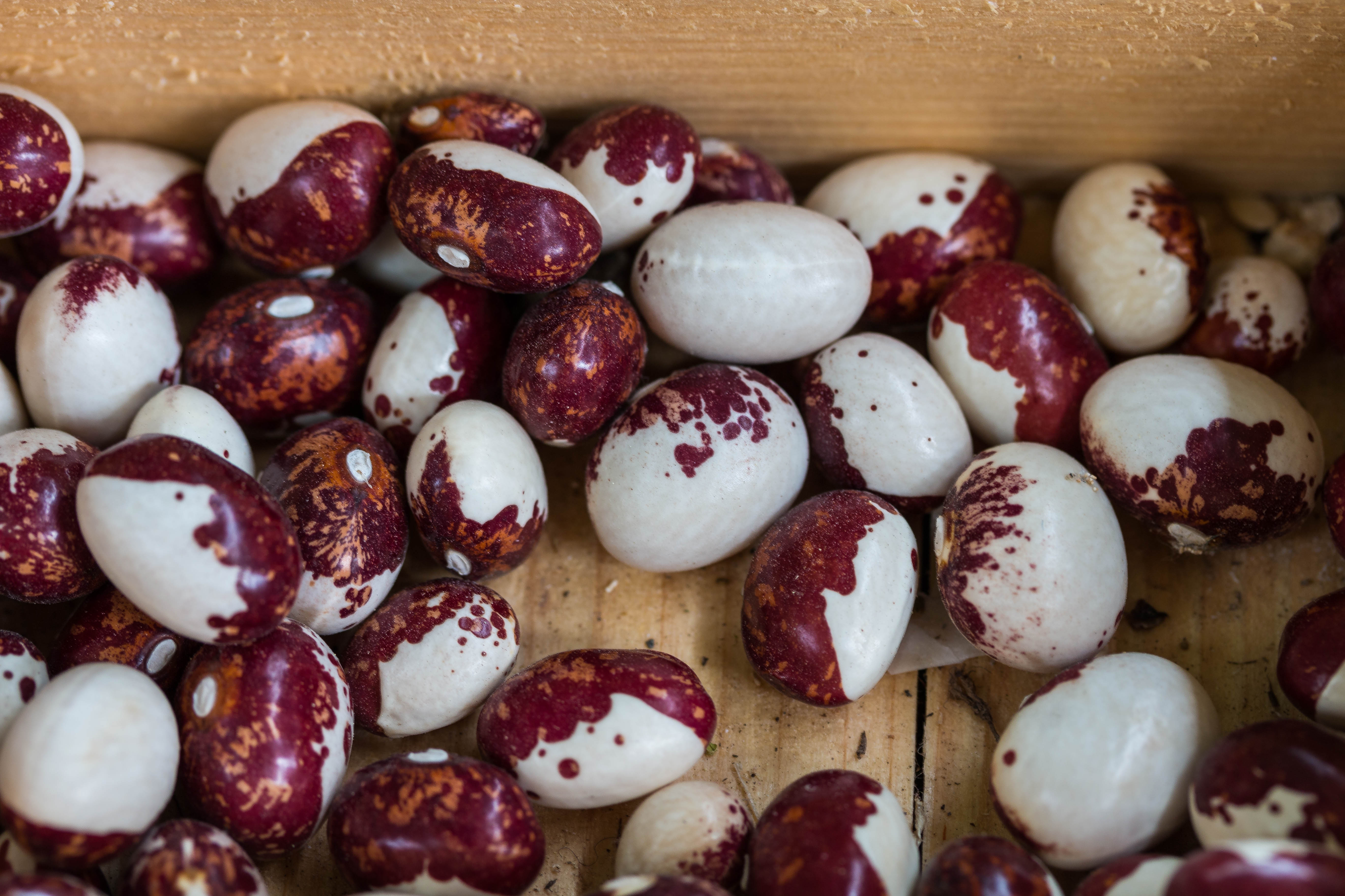 rote Augenbohne